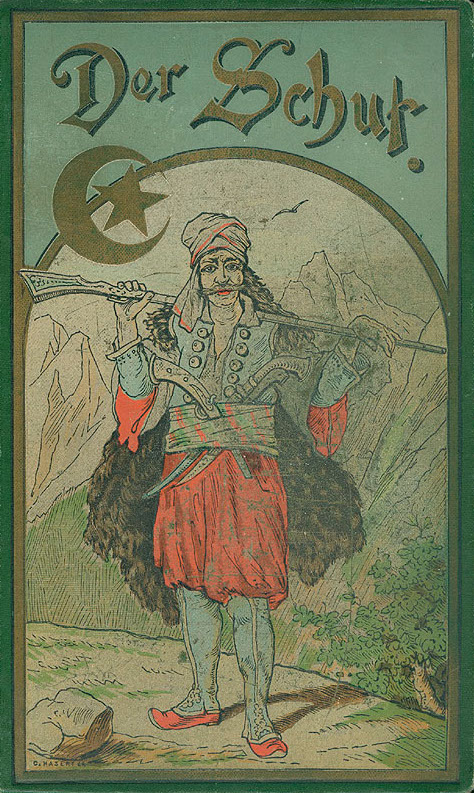 Buchdeckel der klassischen Ausgabe (1892 bis 1898) der Erzählung Der Schut von Karl May.